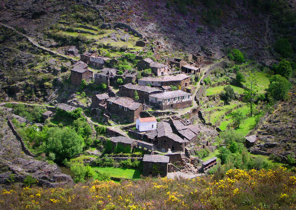 Vista geral da aldeia da Drave, concelho de Arouca, Portugal.